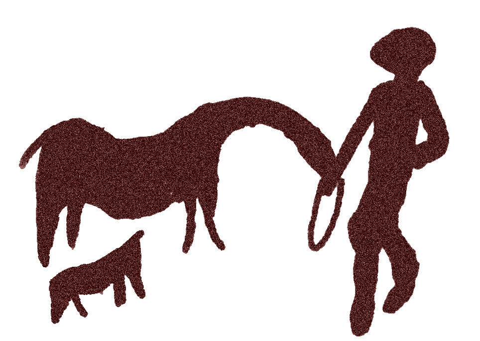 Arte esquemático ibérico: Escena de apacentamiento de un caballo en Peñapascuala